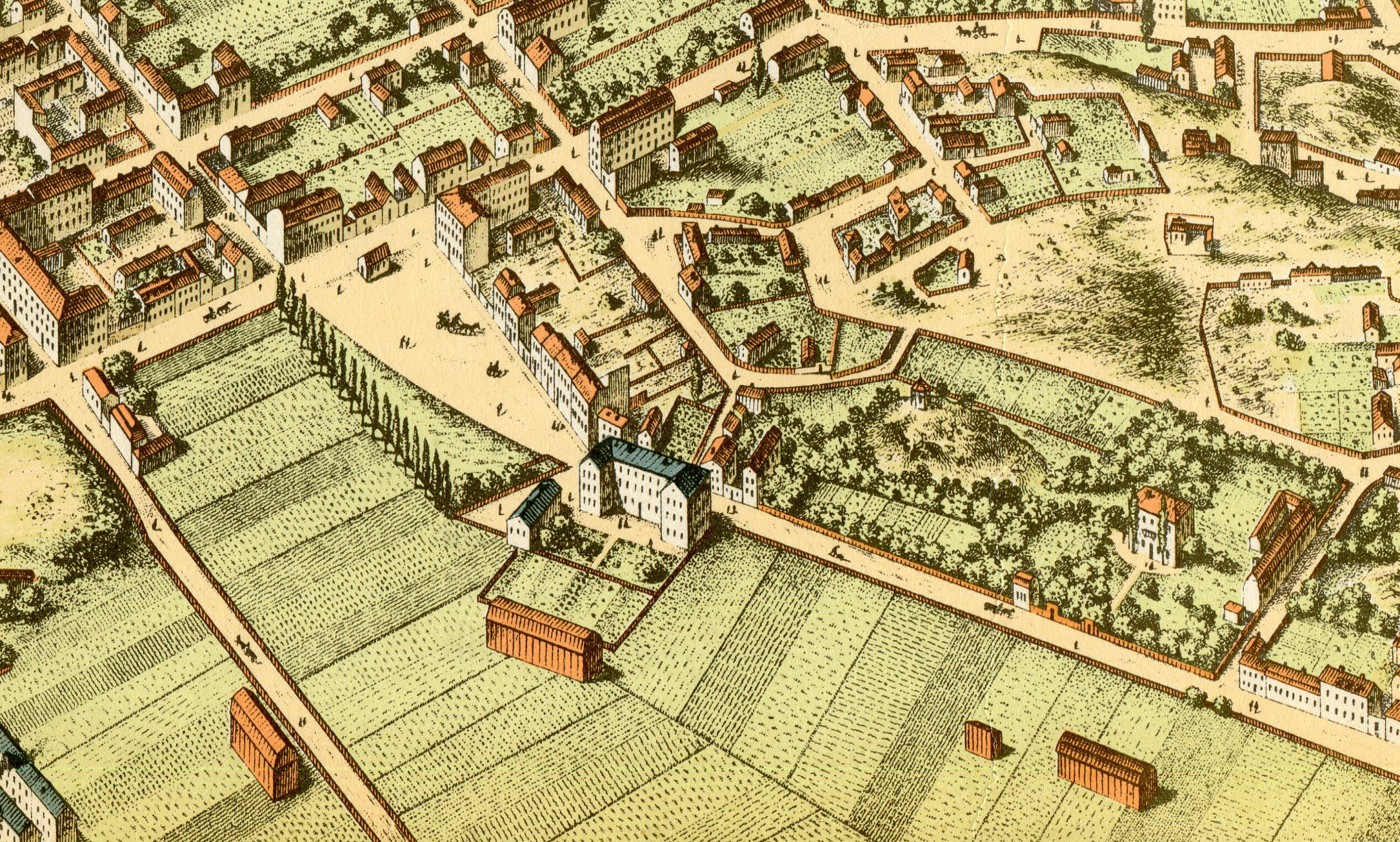 Neuhaus panorama med Nytorget, Malongen, Groens malmgård